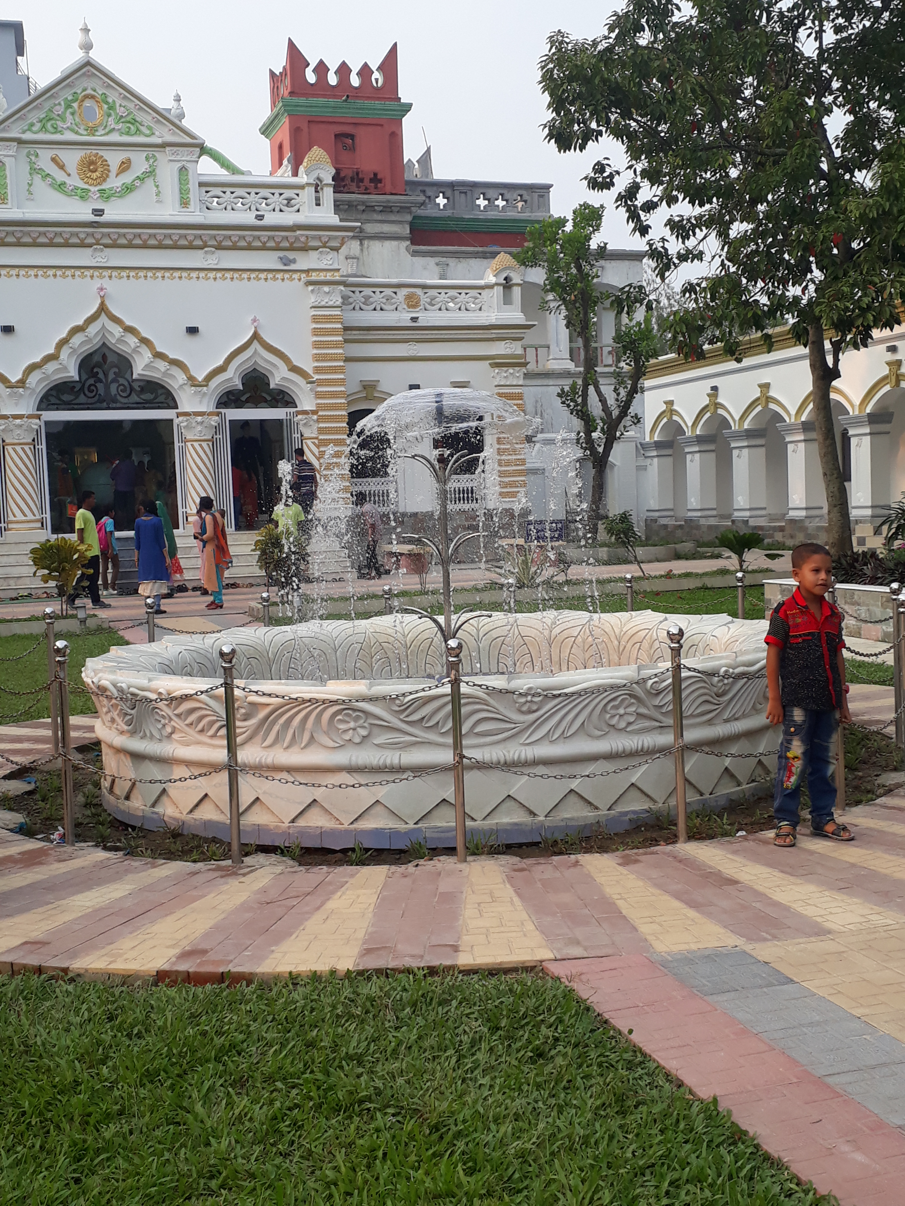 এটি মহেরা জমিদার বাড়ি'র একটি অংশের ছবি। বাংলাদেশের টাঙ্গাইল জেলায় অবস্থিত মহেরা জমিদার বাড়ি বাংলাদেশের অন্যতম ঐতিহাসিক স্থাপনা ও স্থাপত্যকীর্তি। মহেড়া জমিদার বাড়ীটি মূলতঃ চার টি ভবনে বেষ্টিত। যথা- মহারাজ লজ, আনন্দ লজ, চৌধুরী লজ এবং রাণী ভবন (কালীচরণ লজ) নামে পরিচিত। ধারণা পাওয়া যায় স্পেনের করডোভা নগরীর আদলে ভবনসমূহ প্রতিষ্ঠিত হয়েছিল।